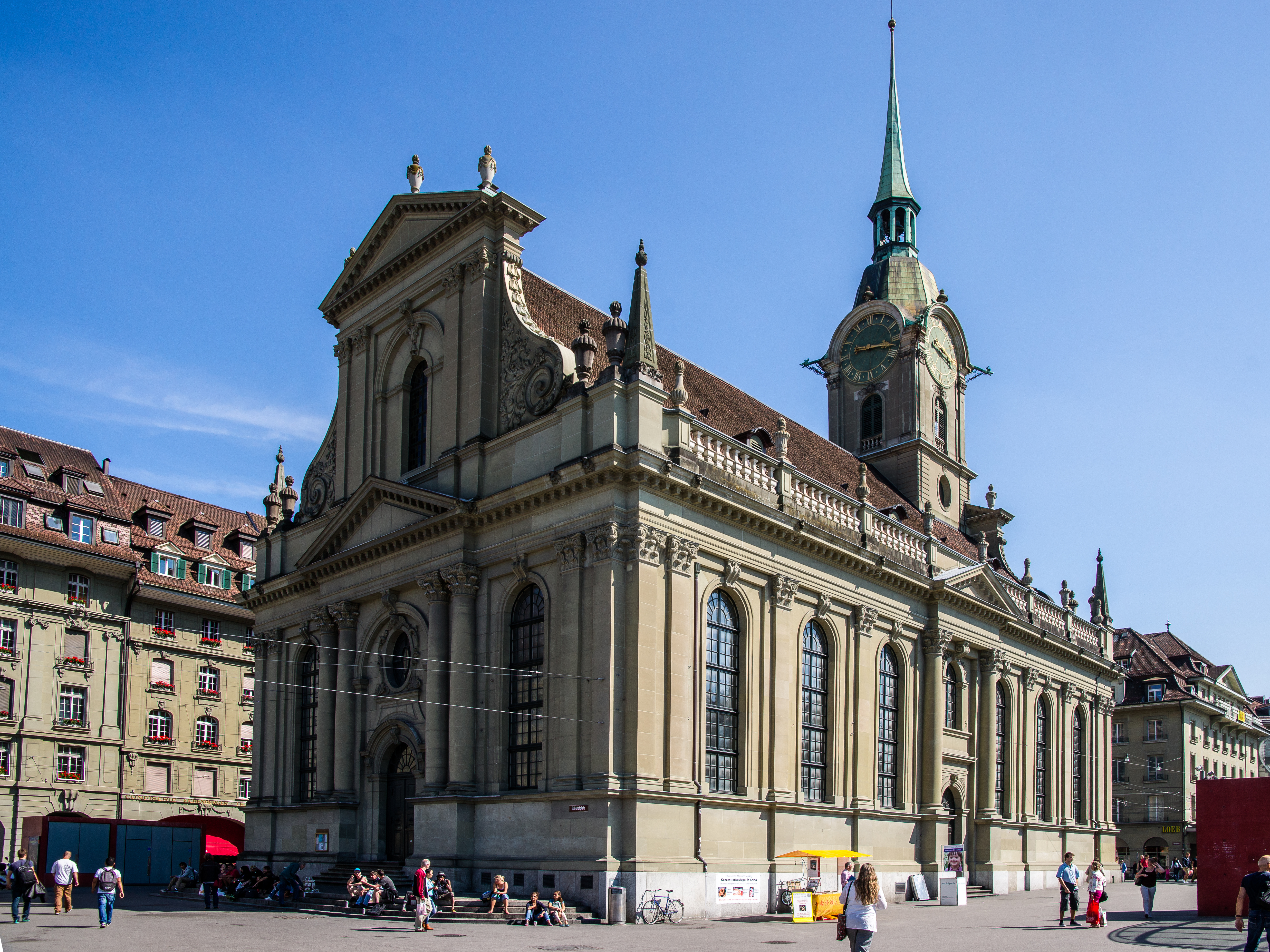 Am Westrand der Altstadt von Bern steht diese barocke Kirche heute mitten in der Stadt unmittelbar neben dem Bahnhof. Sicht vom Bahnhofeingang her.